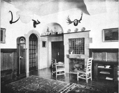 Summer Residence Gaaden_Skoda Main Hall